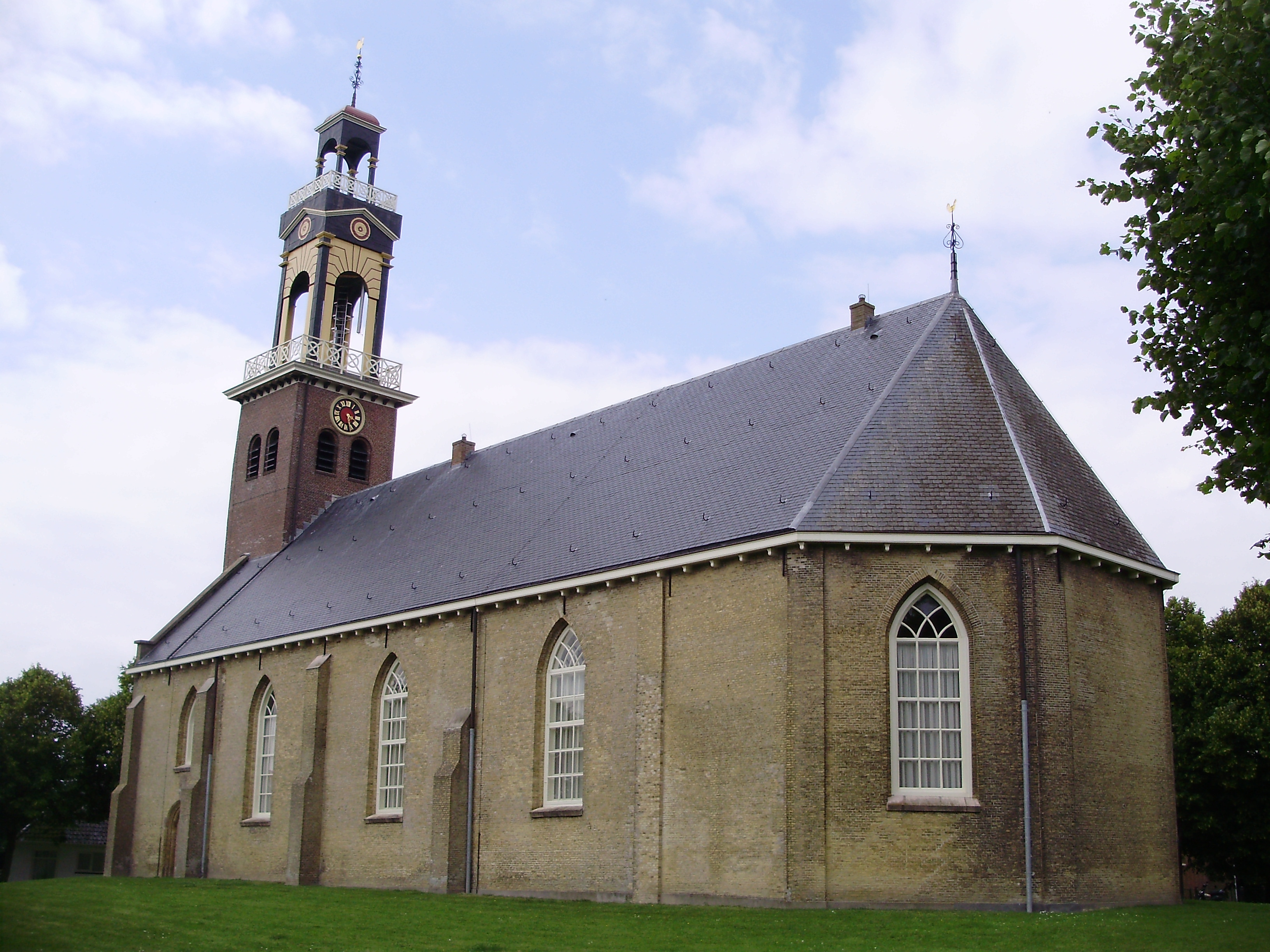 De hervormde kerk in Arum, gemeente Súdwest-Fryslân